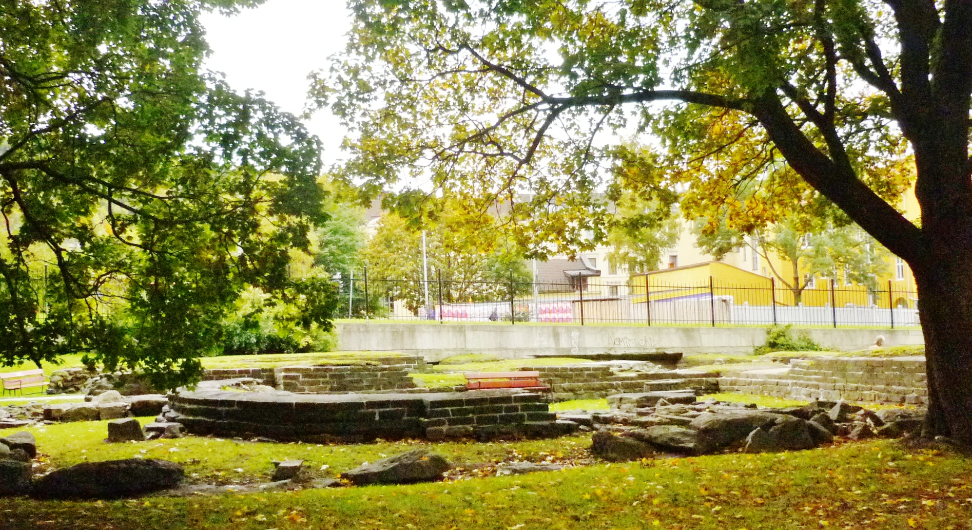 St. Hallvards katedralens ruiner